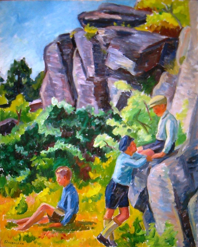 Pojkar